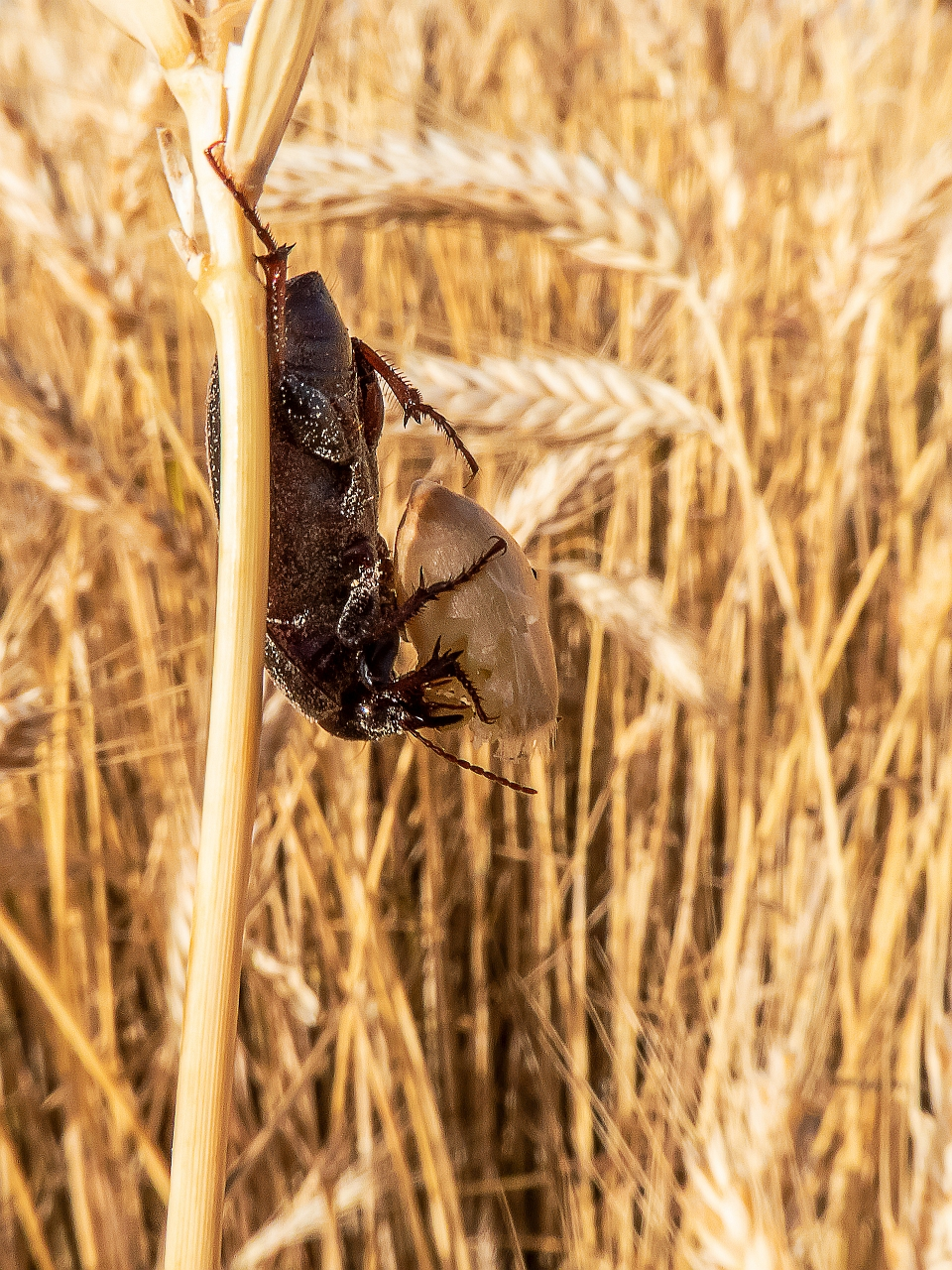 Łokaś garbatek (Zabrus gibbus)